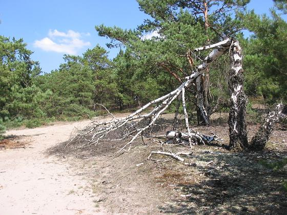 Glau Slemphout2.jpg Totholz, Glauer Berge, Brandenburg Totholz und typischer Märkischer Sand im Naturpark Nuthe-Nieplitz, nahe Blankensee Selbst fotografiert, August 2004 GNU FDL